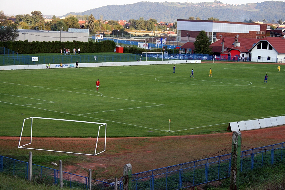 Stadion u Samoboru